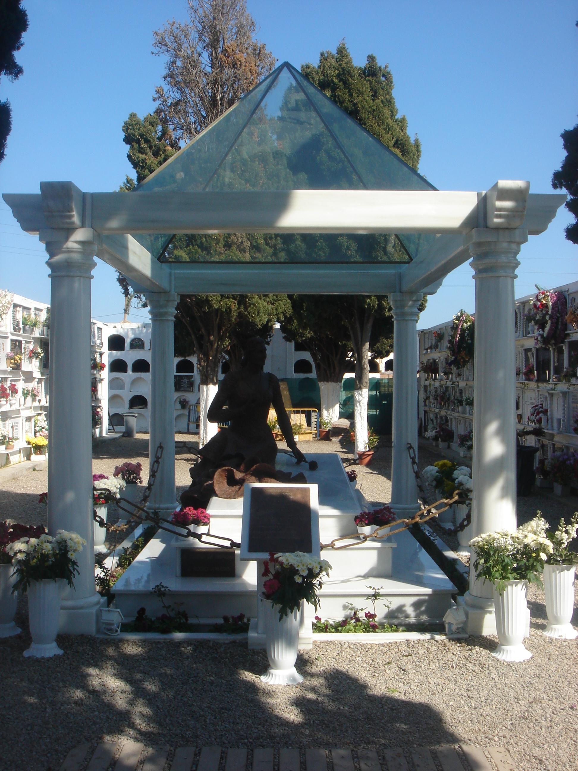 Tumba de Rocío Jurado en el cementerio de Chipiona